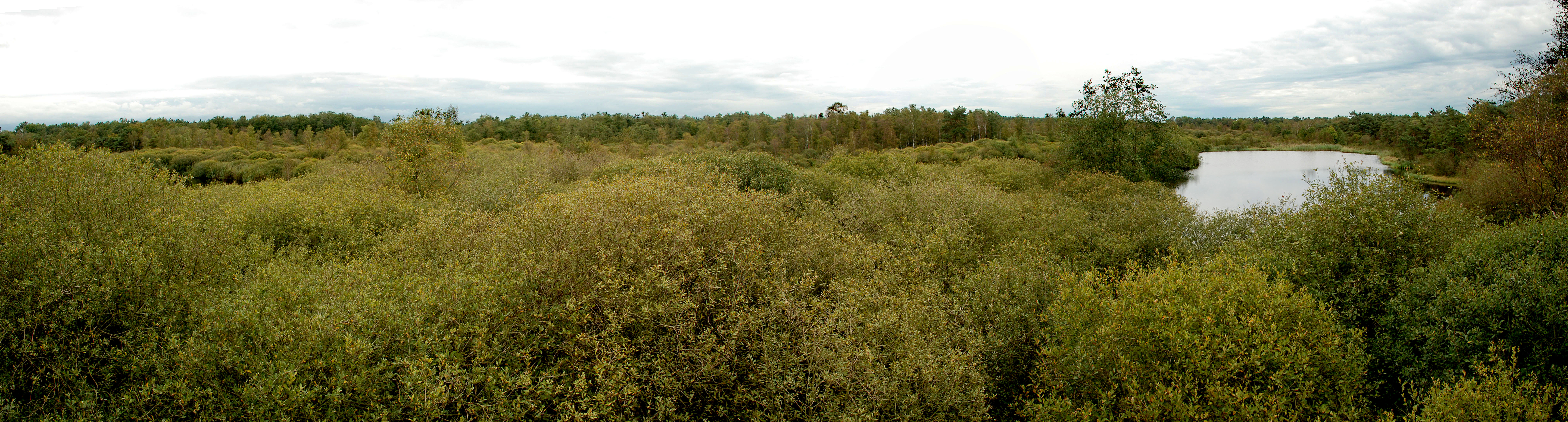 De Lierdeman panorama